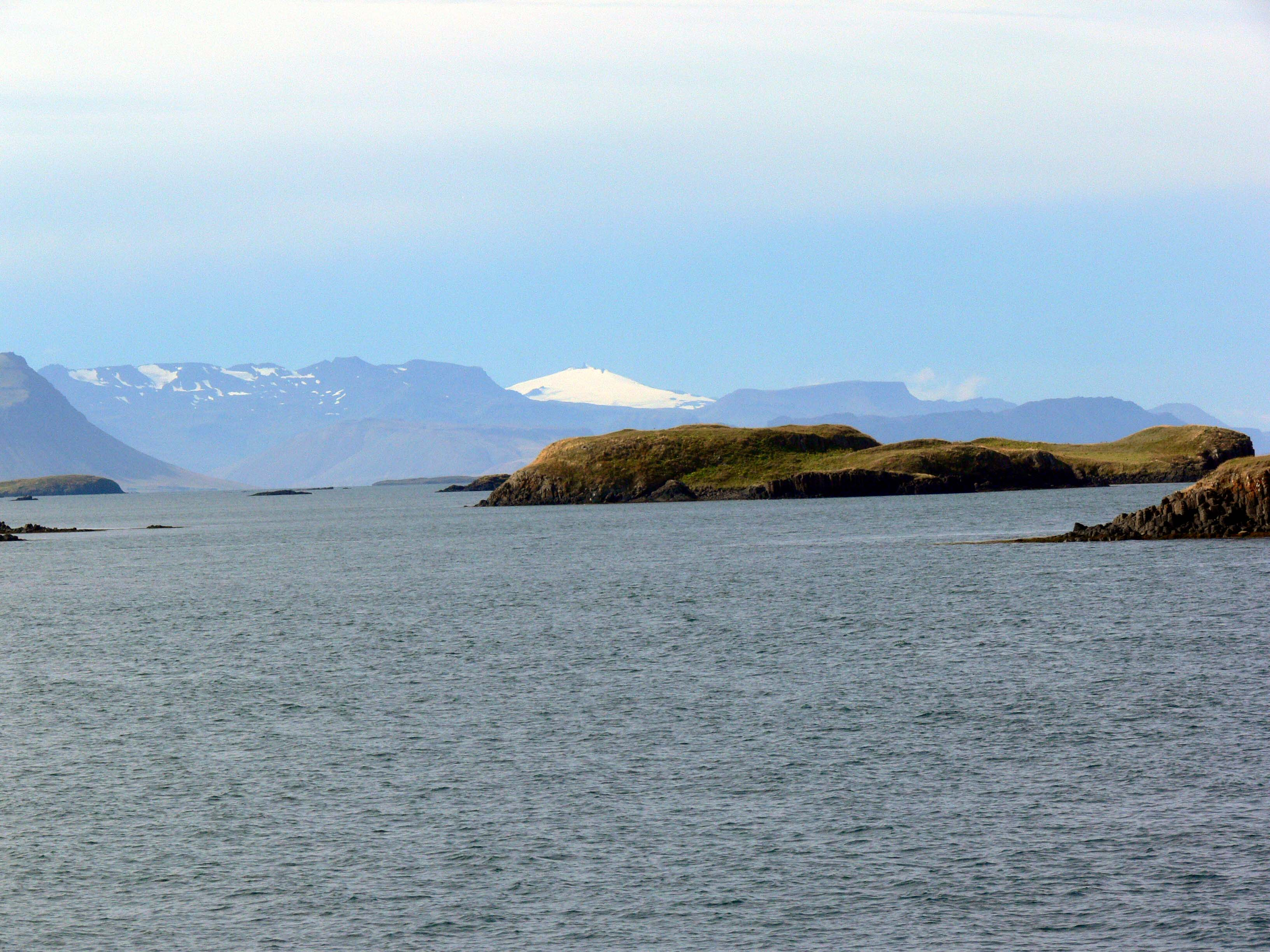 Inseln des Breiðafjörður. Im Hintergrund der Snæfellsjökull.